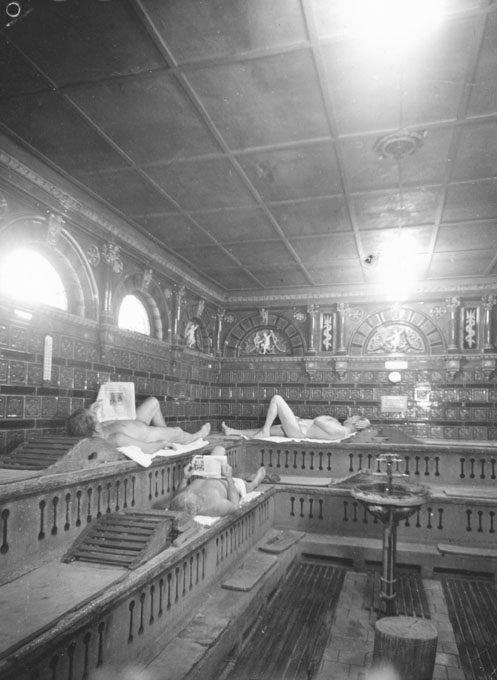 Herrturken på Södermalms tvätt- och badinrättning rivet 1944 Fotonummer F 34261